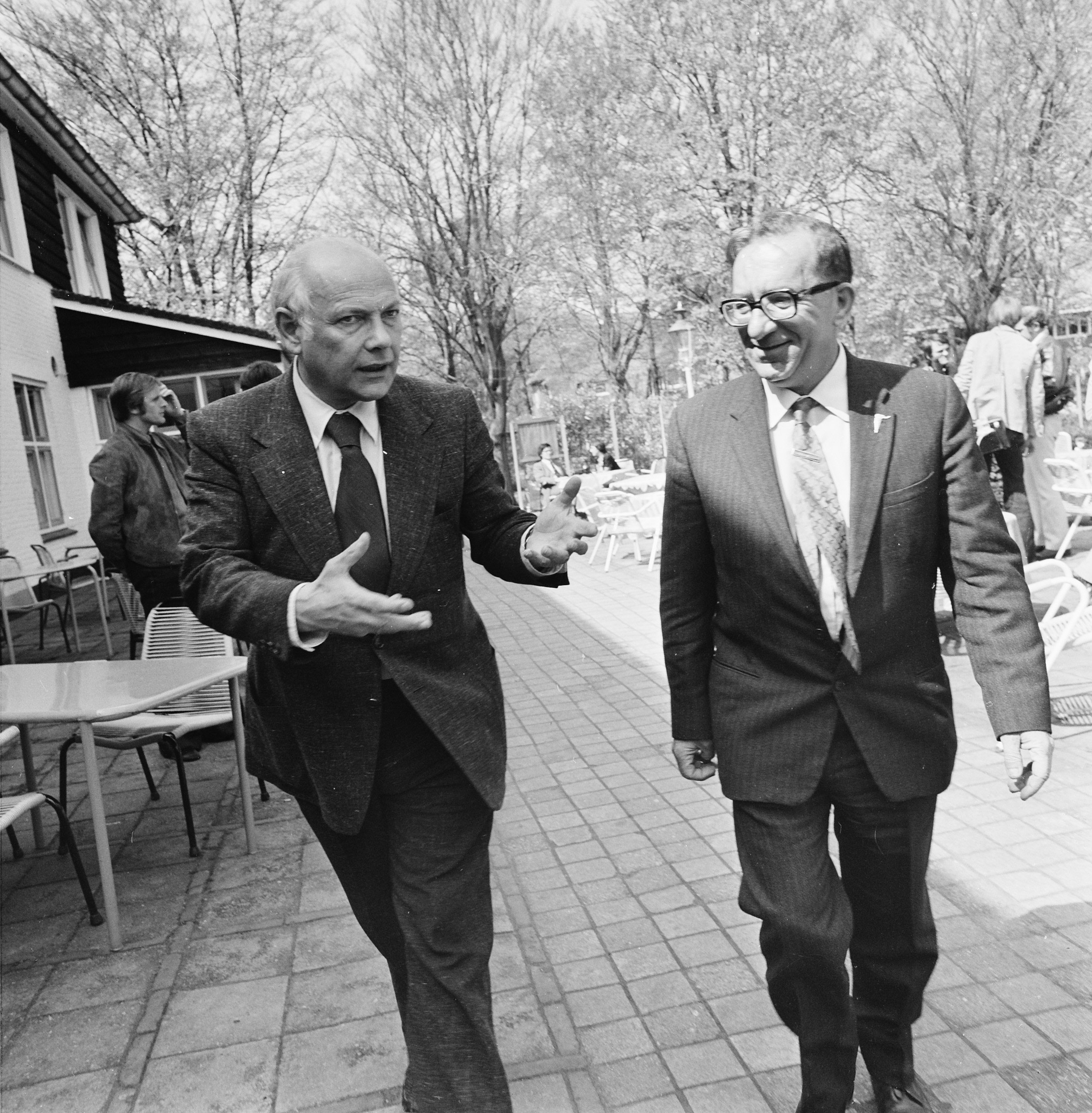 Collectie / Archief : Fotocollectie Anefo Reportage / Serie : [ onbekend ] Beschrijving : Premier Mintoff van Malta in ons land, premier Den Uyl en premier Mintoff in Wassenaar Datum : 26 april 1974 Locatie : Wassenaar, Zuid-Holland Trefwoorden : bezoeken, premiers Persoonsnaam : Mintoff, Dominic, Uyl, Joop den Fotograaf : Punt, […] / Anefo Auteursrechthebbende : Nationaal Archief Materiaalsoort : Negatief (zwart/wit) Nummer archiefinventaris : bekijk toegang 2.24.01.03 Bestanddeelnummer : 927-1519